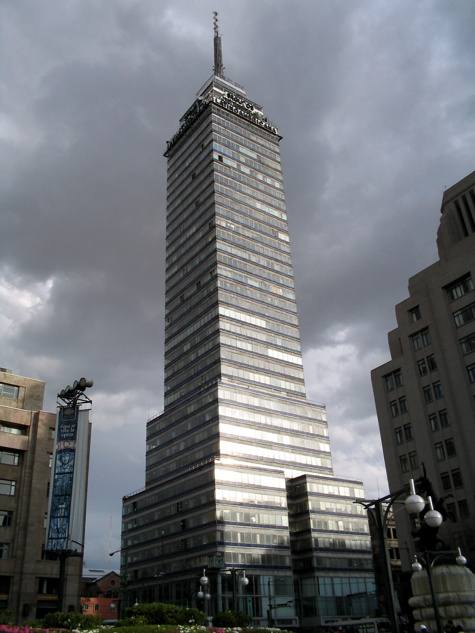 Vista de la Torre Latinoamericana en la Ciudad de México